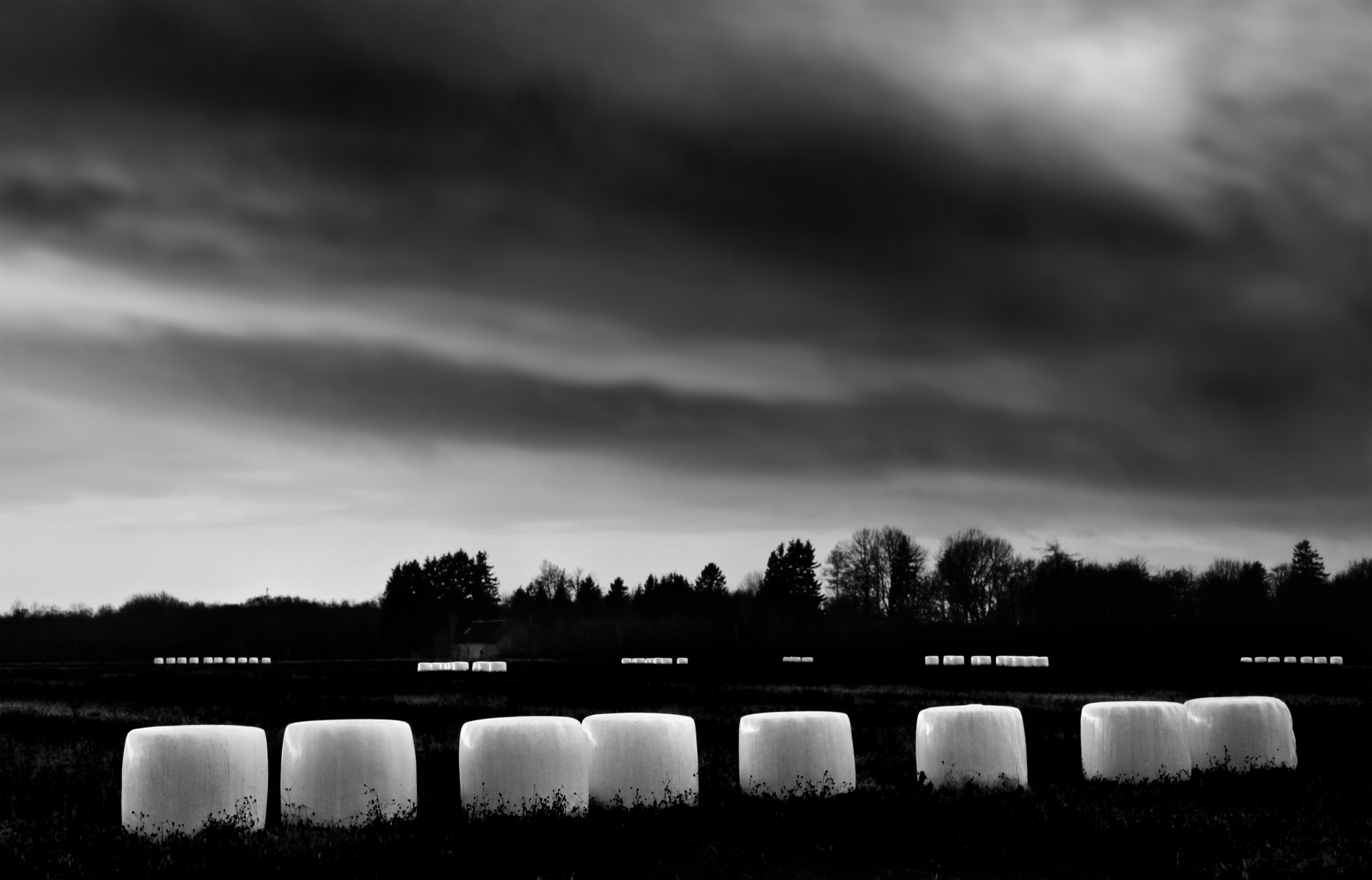 Heinategu on lõppenud